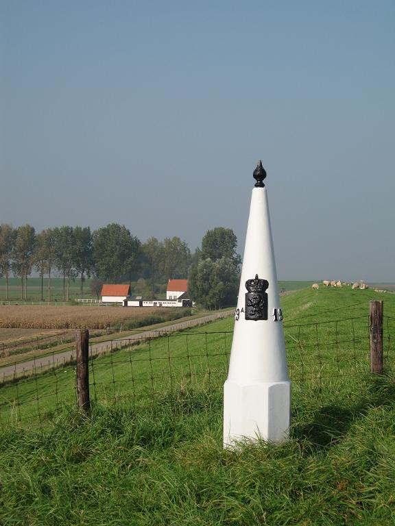 Eigen media Grenspaal 269a (Belgisch-Nederlandse grens) op de linkeroever van de Schelde